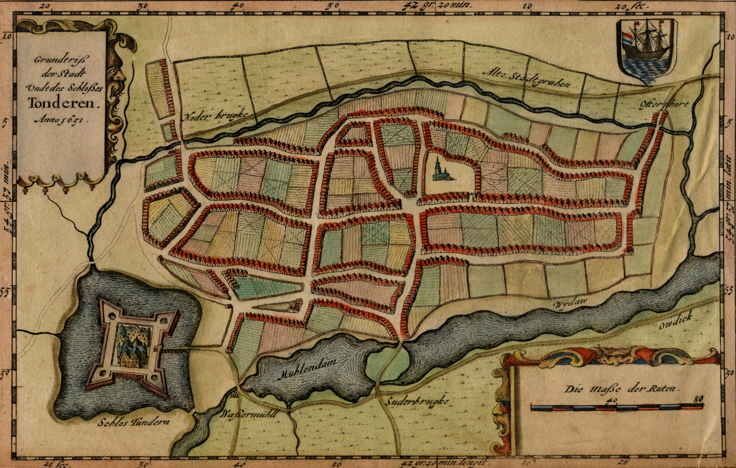 Plan der Stadt Tondern im Jahre 1651, Druck, handkoloriert